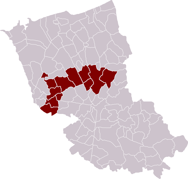 Locatie Kanton Wormhout in het arrondissement Duinkerke, Frankrijk - zelfgemaakt Location Canton of Wormhout in the Dunkirk district, France - self made Localisation Canton de Wormhout dans l'arrondissement de Dunkerque, France - fait moi-même